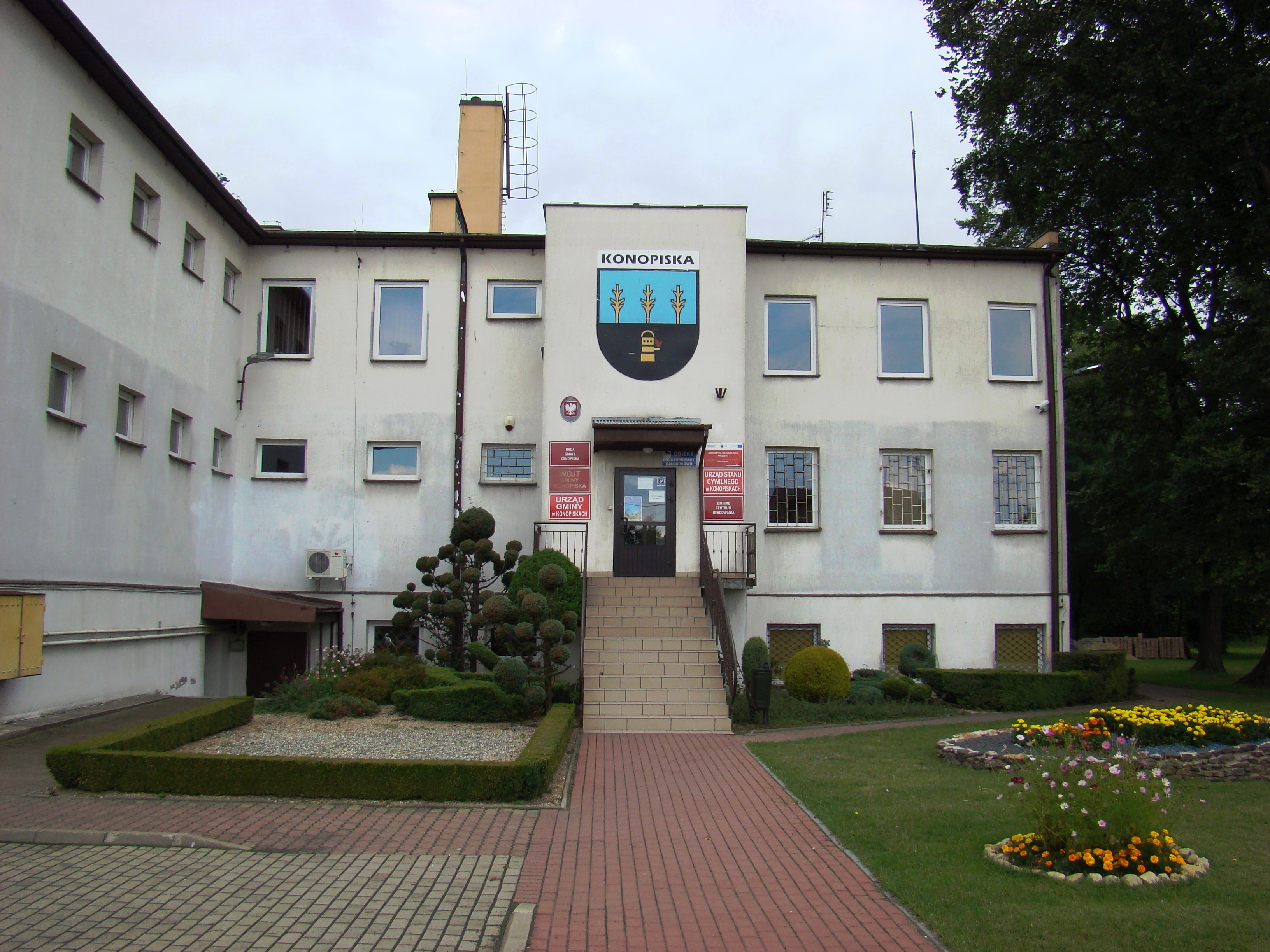 Urząd Gminy Konopiska